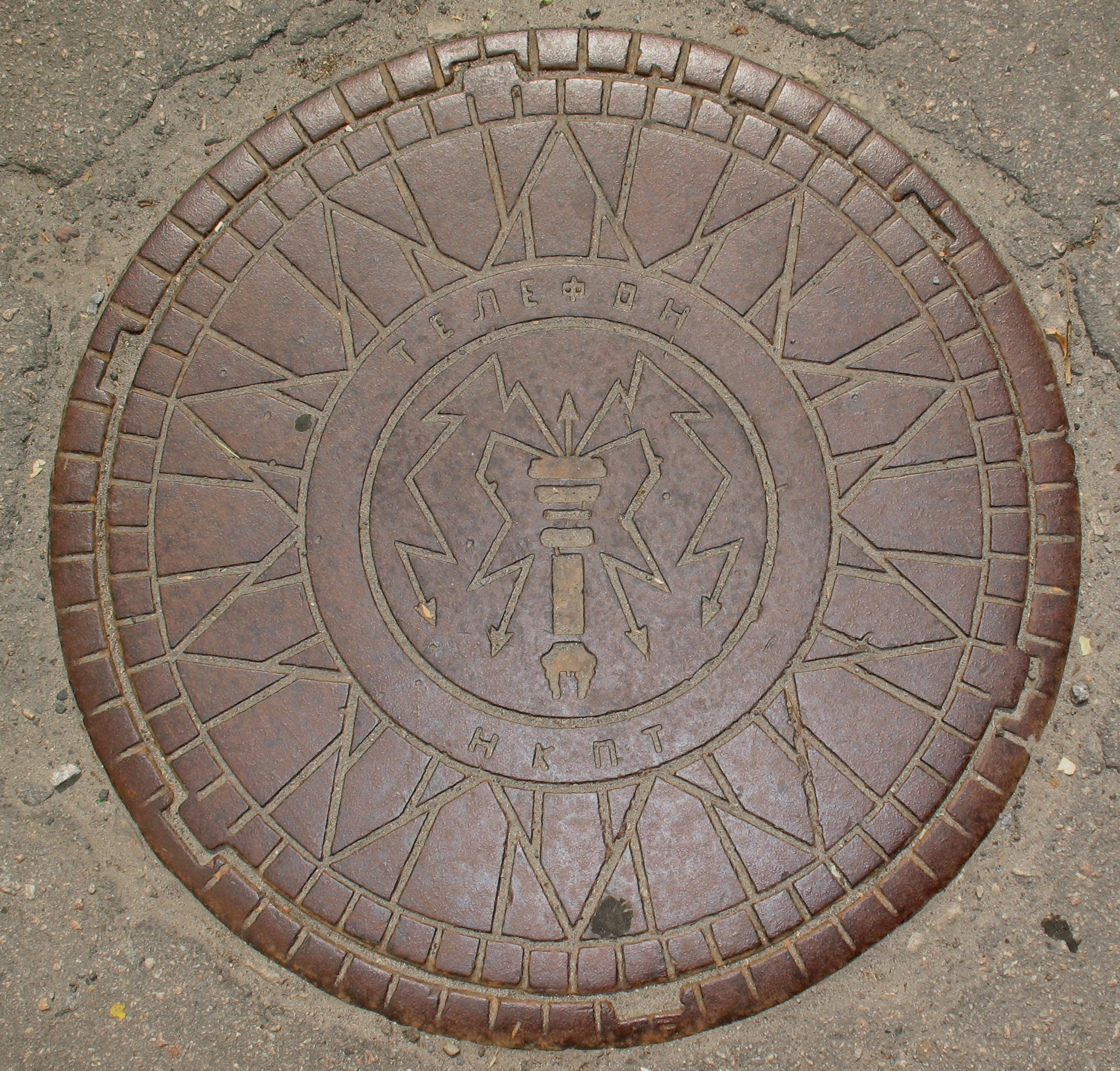 Народный комиссариат почт и телеграфа СССР (НКПТ). Стальная либо чугунная крышка телефонного люка (линия прокладывалась в конце 1920-х; до 1932, когда наркомат был переименован) с эмблемой наркомата в виде электрического разъёма и изолятора с молниями, вписанной в десятиконечную звезду. Харьков, угол Московского проспекта и Красношкольной набережной, возле гимназии, где учился академик Вернадский. Данная эмблема использовалась в качестве эмблемы на петлицах формы НКПТ.